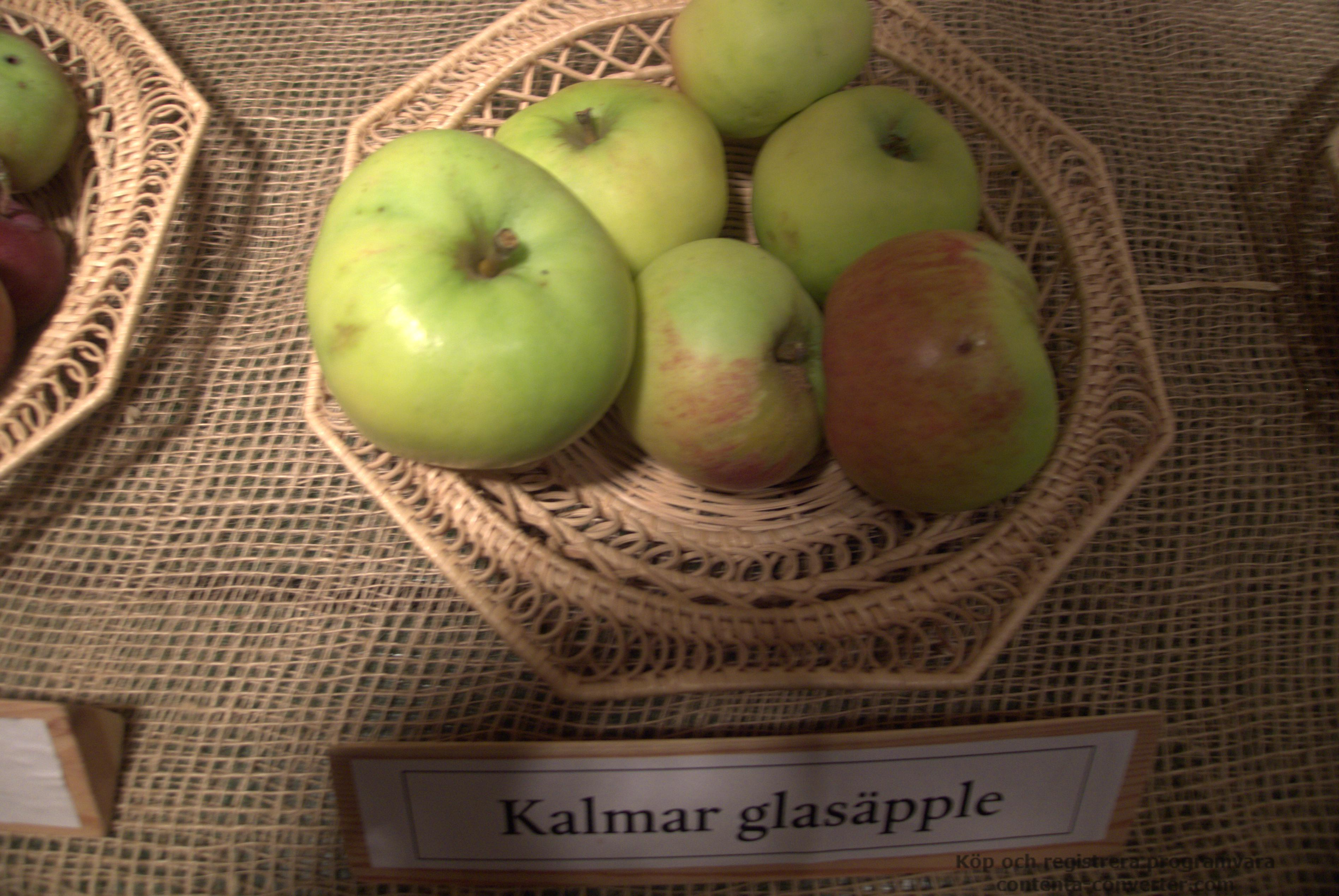 Äpplen av sorten Kalmar glasäpple.